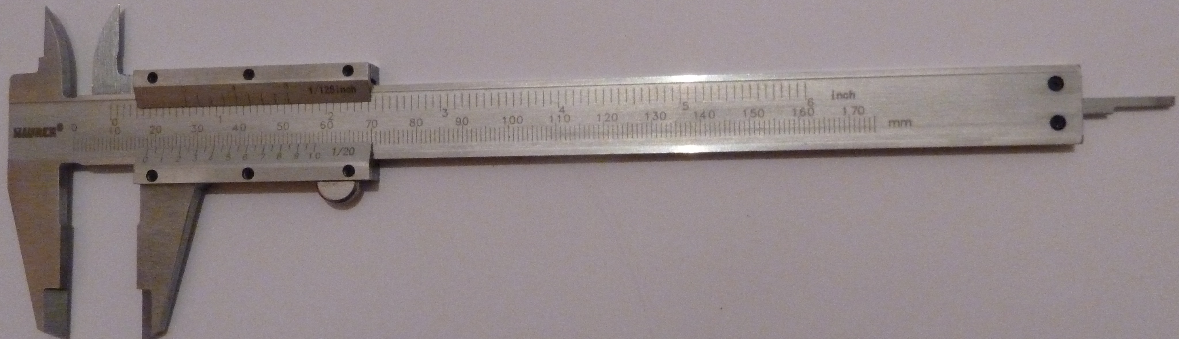 Messschieber; Besonderheit: Angaben in Millimetern